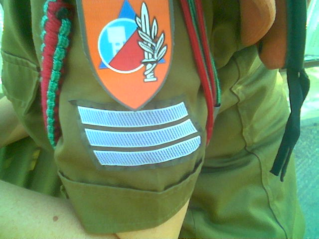 שרוף המאלש"ח רישיון נוצר על ידי משתמש:Benraha